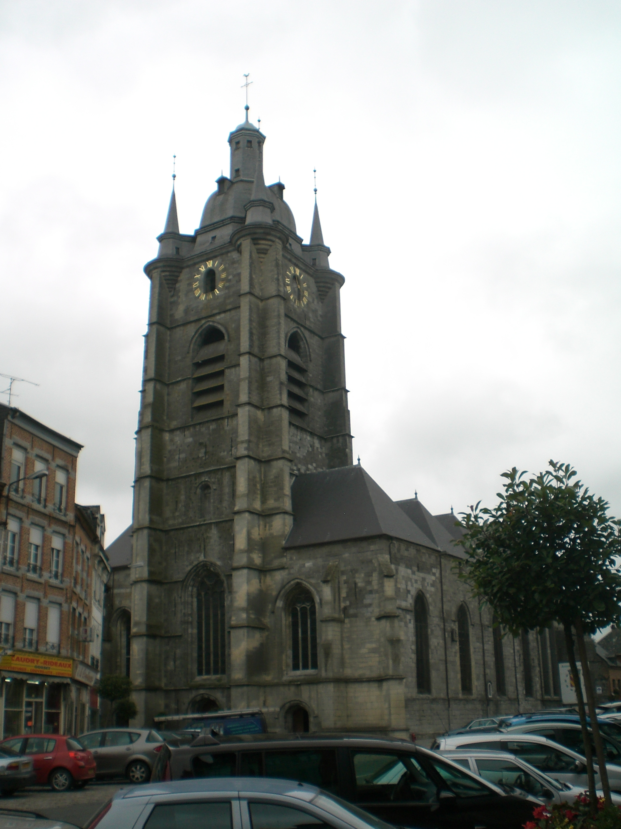 collegiale st nicolas d'avesnes sur help nord france